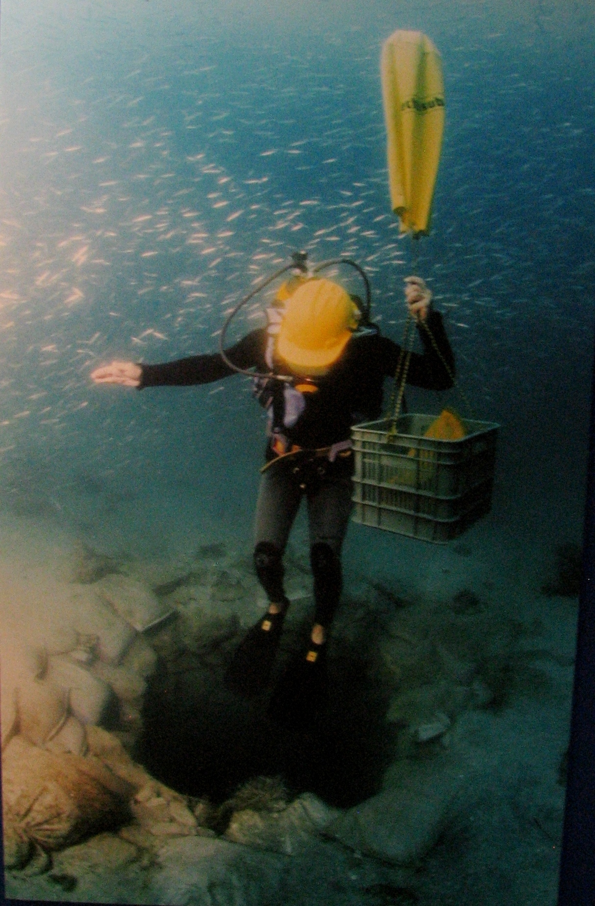 Atlit Yam is an ancient submerged Neolithic village off the coast of Atlit, Israel. The site is dated to the final Pre-Pottery Neolithic B site of Atlit Yam dates between 6900 and 6300 BC. Moshe Stekelis Museum of Prehistory exhibition in Haifa Israel The exhibition is based on the excavations and researches of the Haifa University and Antiquities Authority. Photography by Yosef Galili, Ehud Galili, Itamar Greenberg הכפר הניאוליתי בעתלית-ים שוכן בתוך הים במרחק 400 מטר מקו החוף, מערבית לשפך נחל אורן בעורפו של רכס כורכר טבוע שבהמשכו דרומה נמצא מבצר עתלית הצלבני. האתר נמצא בעומק של 12-8 מטר מתחת לפני הים. האתר מתוארך לסוף התקופה הנאוליתית קדם קרמית ב סוף האלף ה-6 לפנה"ס ממצאים מהאתר מוצגים במוזיאון לפרהיסטוריה ע"ש משה שטקליס בחיפה הנמצא בתוך גן החיות במרכז הכרמל התערוכה מבוססת על חפירות ומחקרים שהתבצעו על ידי אוניברסיטת חיפה ורשות העתיקות הצילומים מהחפירות המוצגים בתערוכה צולמו על ידי יוסקה גלילי, אהוד גלילי ואיתמר גרינברג צולל יורד לבאר שנמצאה באתר